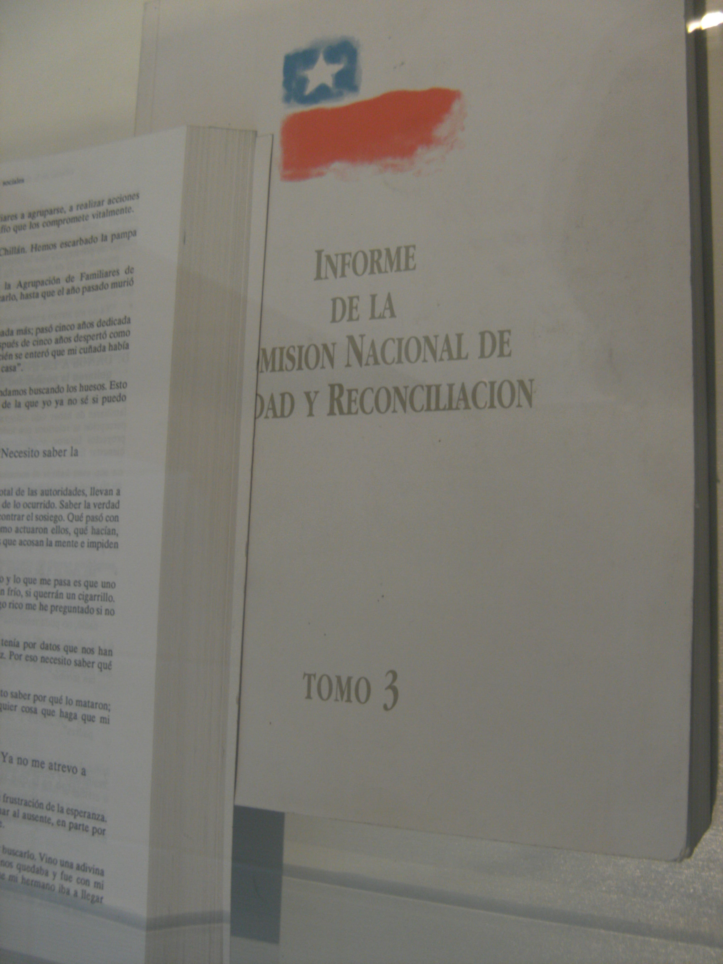 Informe de la Comisión Nacional de Verdad y Reconcialiación de Chile que investigó los crímenes políticos durante la era de Pinochet